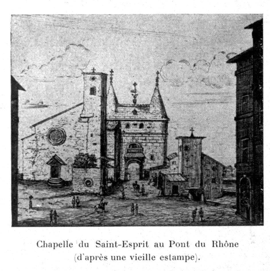 Illustrations pour l'Histoire des églises et chapelles de Lyon